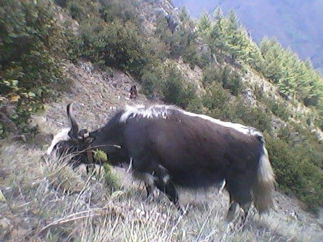 नेपाली: नेपालको हुम्ला जिल्लामा पालिएको चौरी गाई